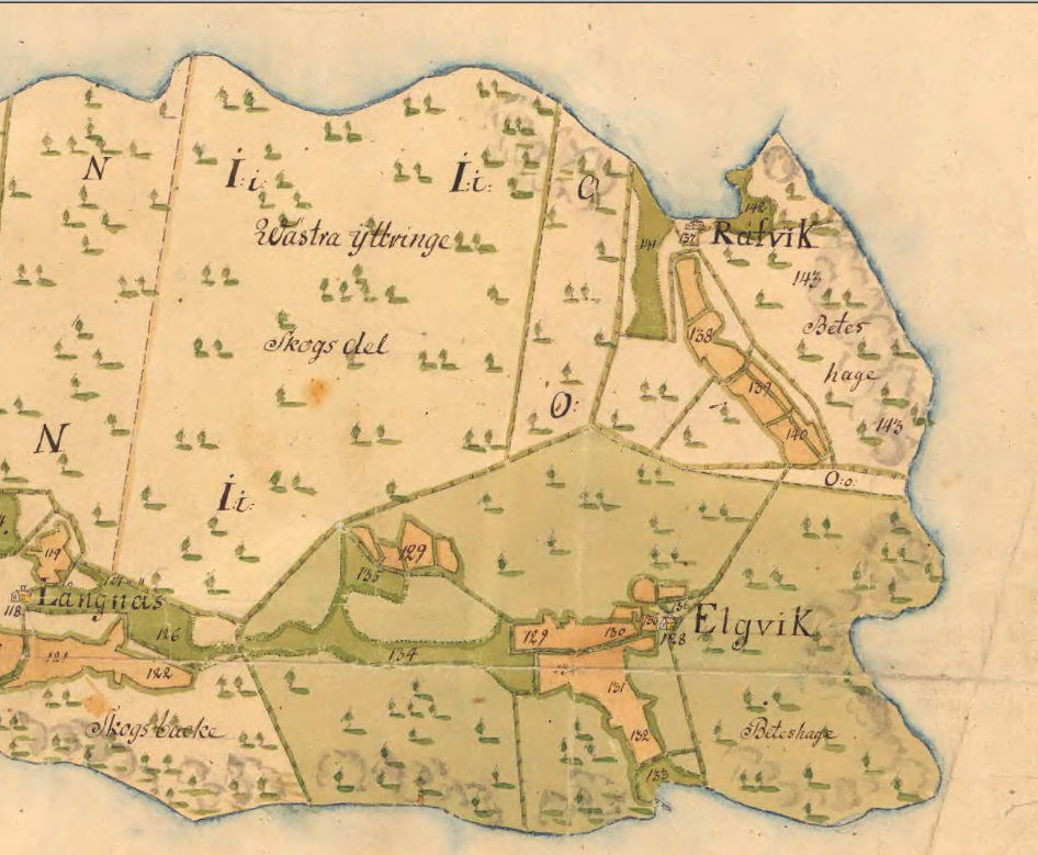 Elfvik gårds ägor på en karta från 1774 efter att laga skogsdelning hade förättats mellan Lidingös frälsehemman i augusti 1774.